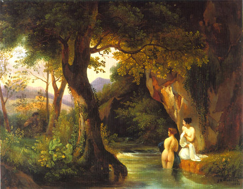 Ninfas con Fauno, pintura romantica.